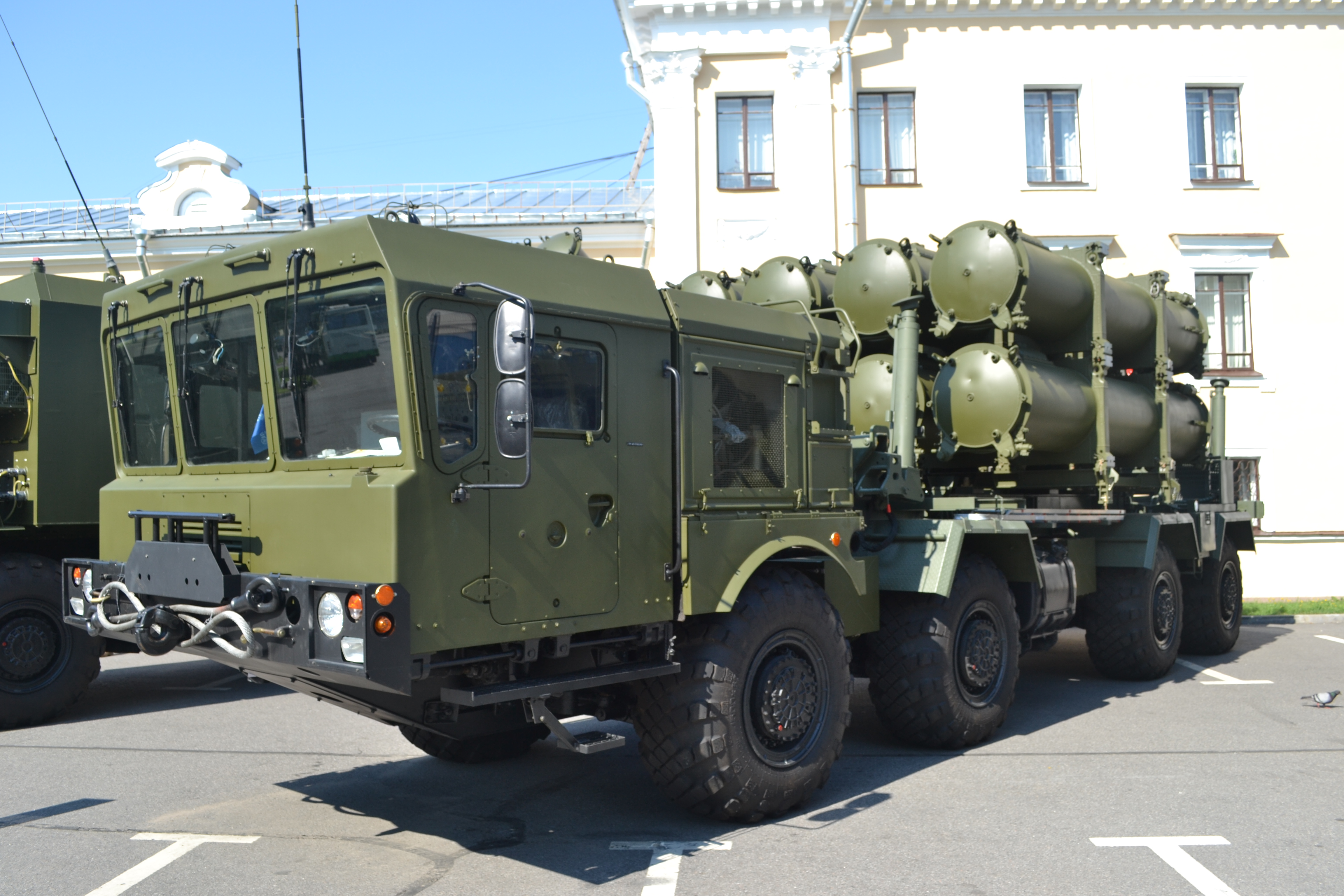 БПРК Бал-Э